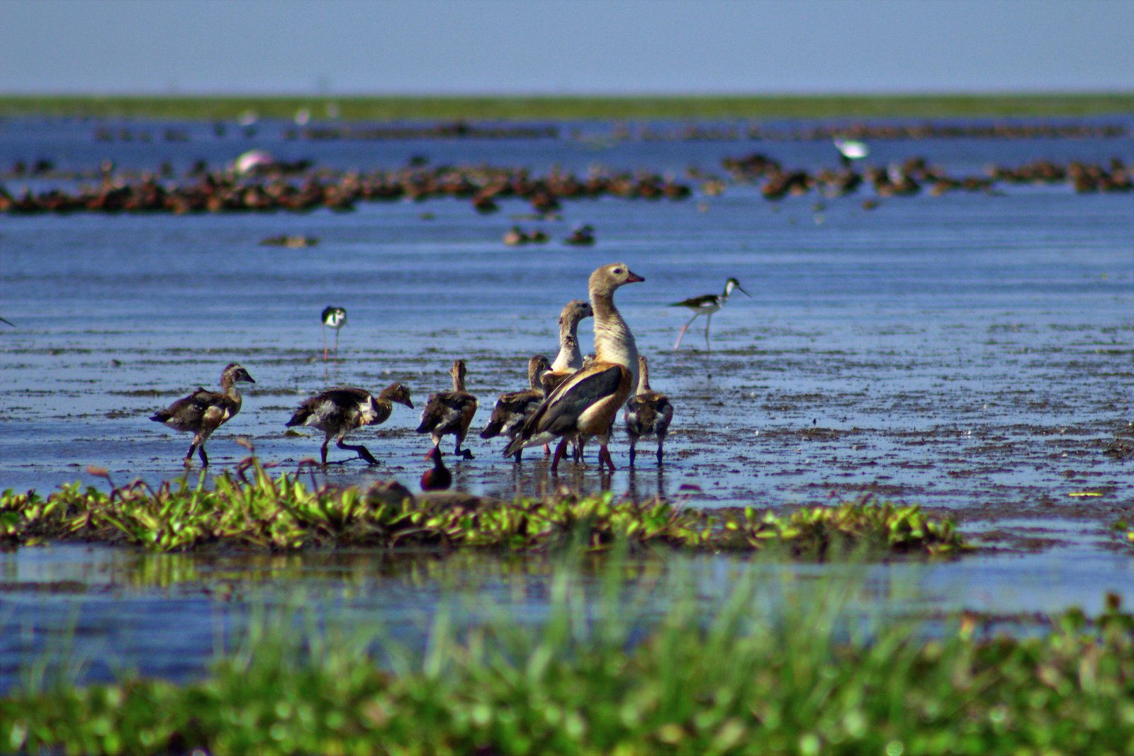 Familia de patos carreteros (Neochen jubata)